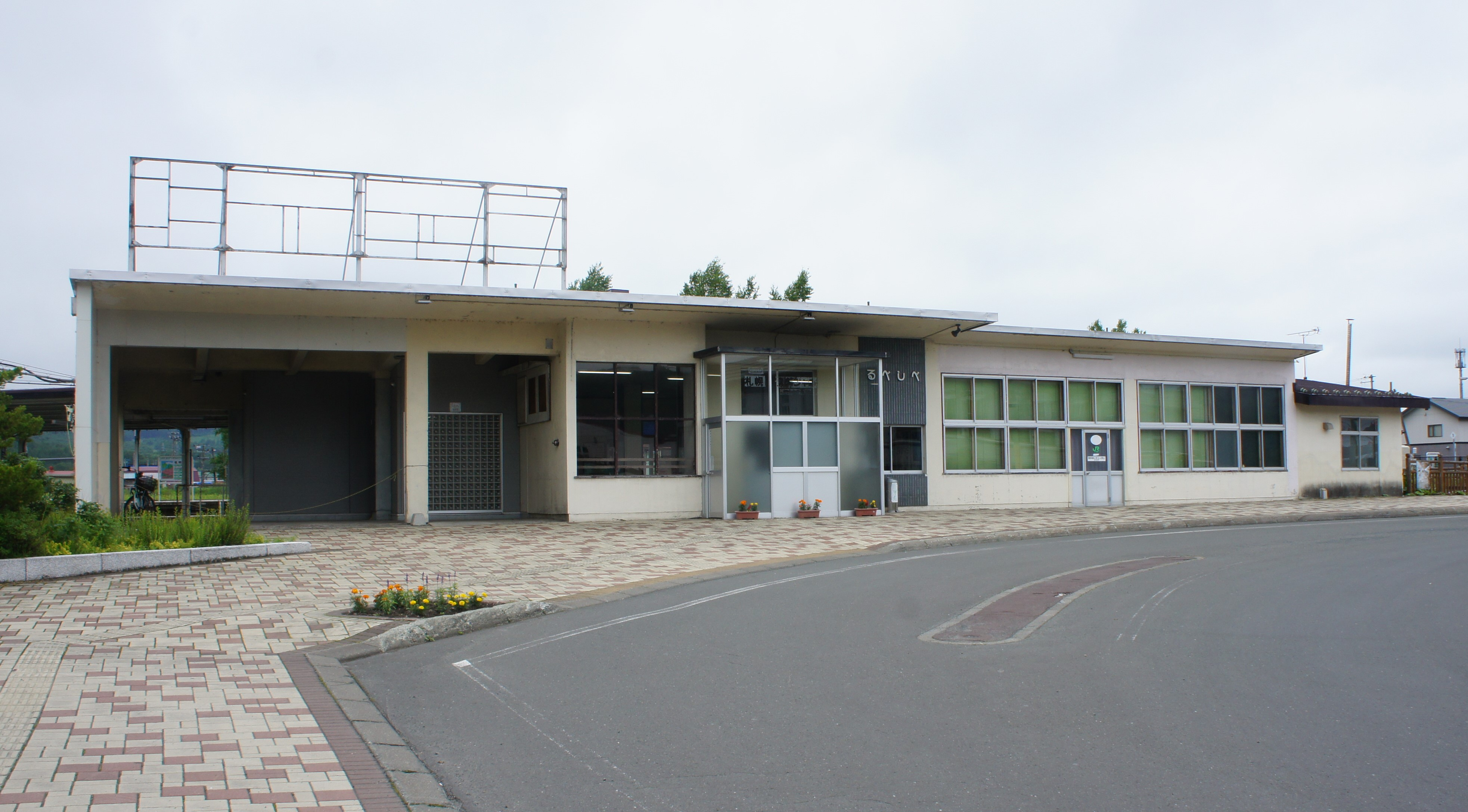 JR石北本線・留辺蘂駅の駅舎